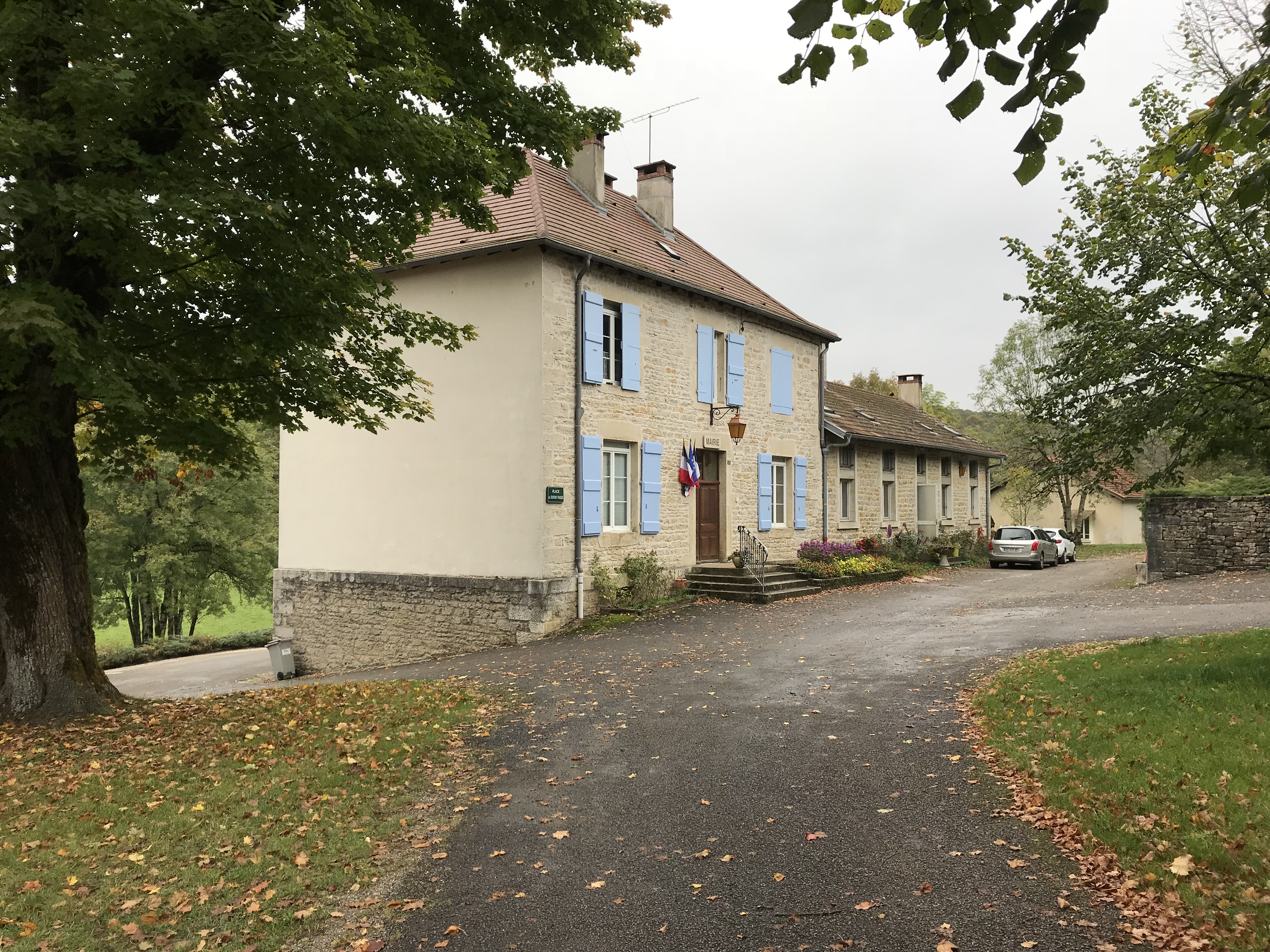 Marigna-sur-Valouse (Jura, France) en octobre 2017.